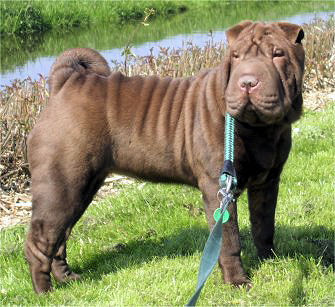 Shar-Pei